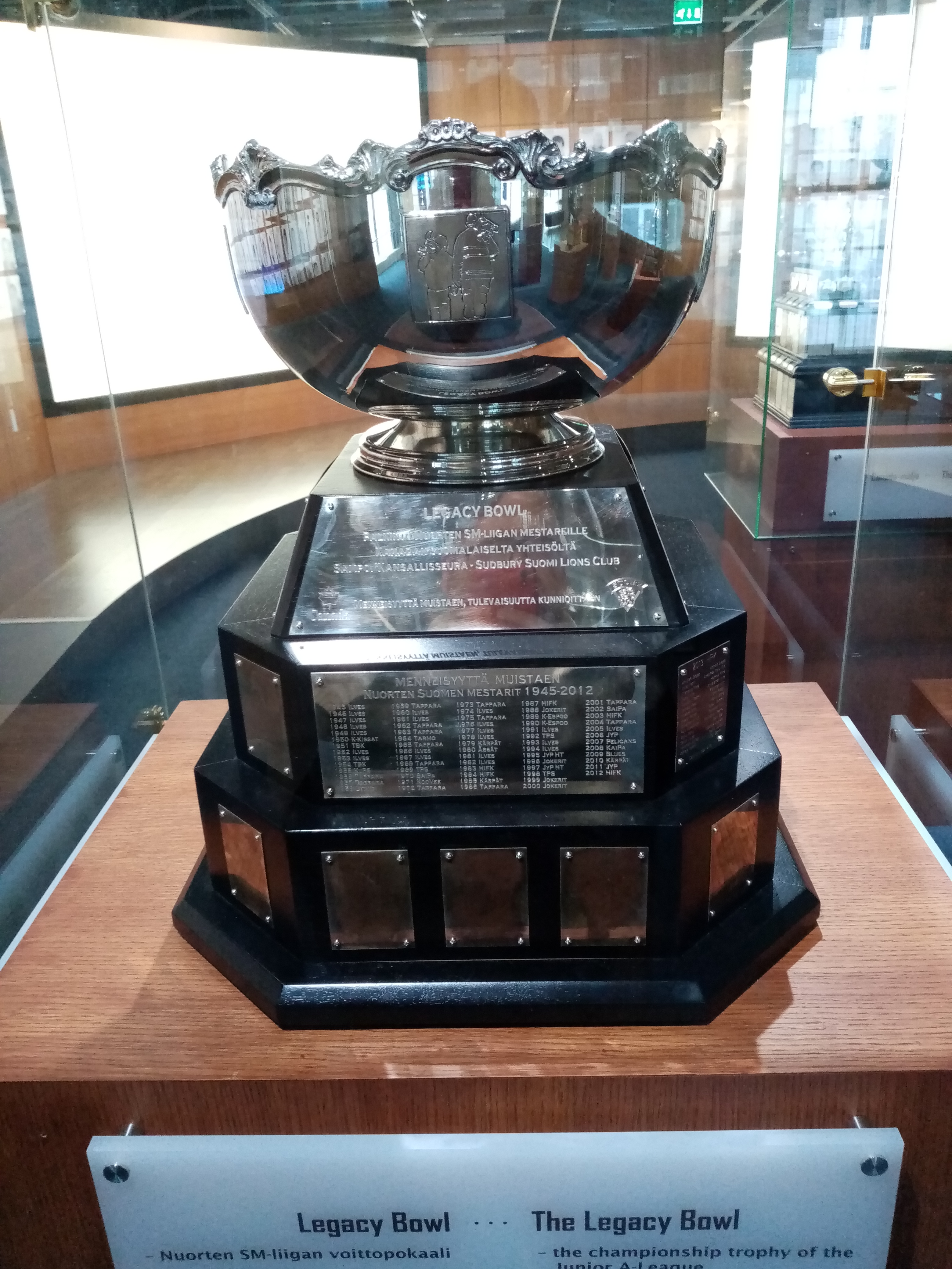 O Legacy Bowl no Museo do Hóckey de Finlandia.